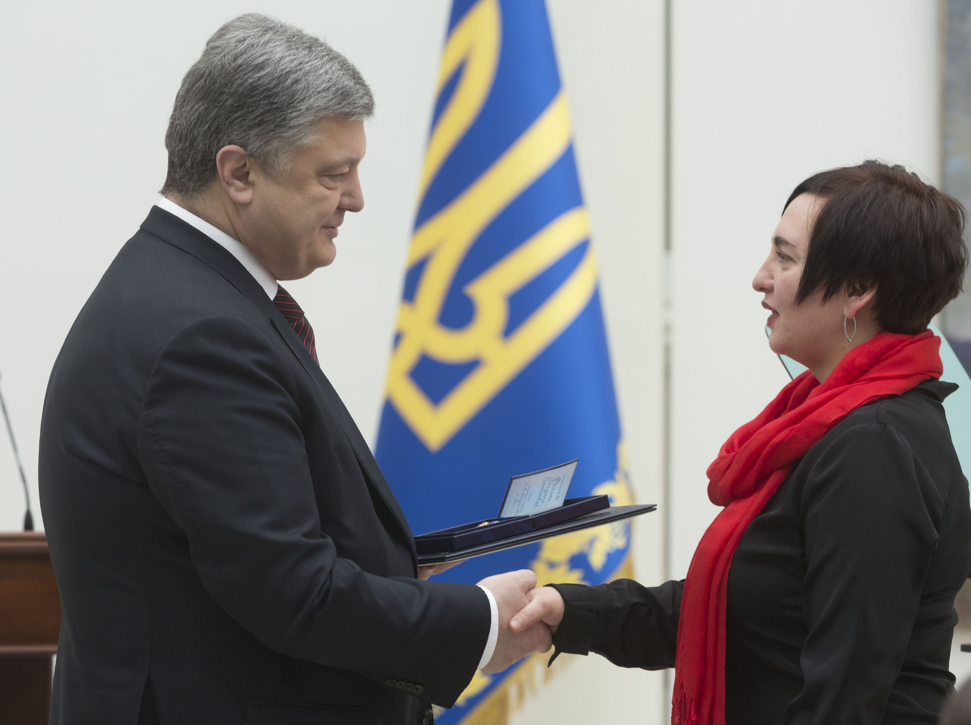 Богдана Фроляк на церемонії вручення Національної премії України імені Тараса Шевченка 2017 року.